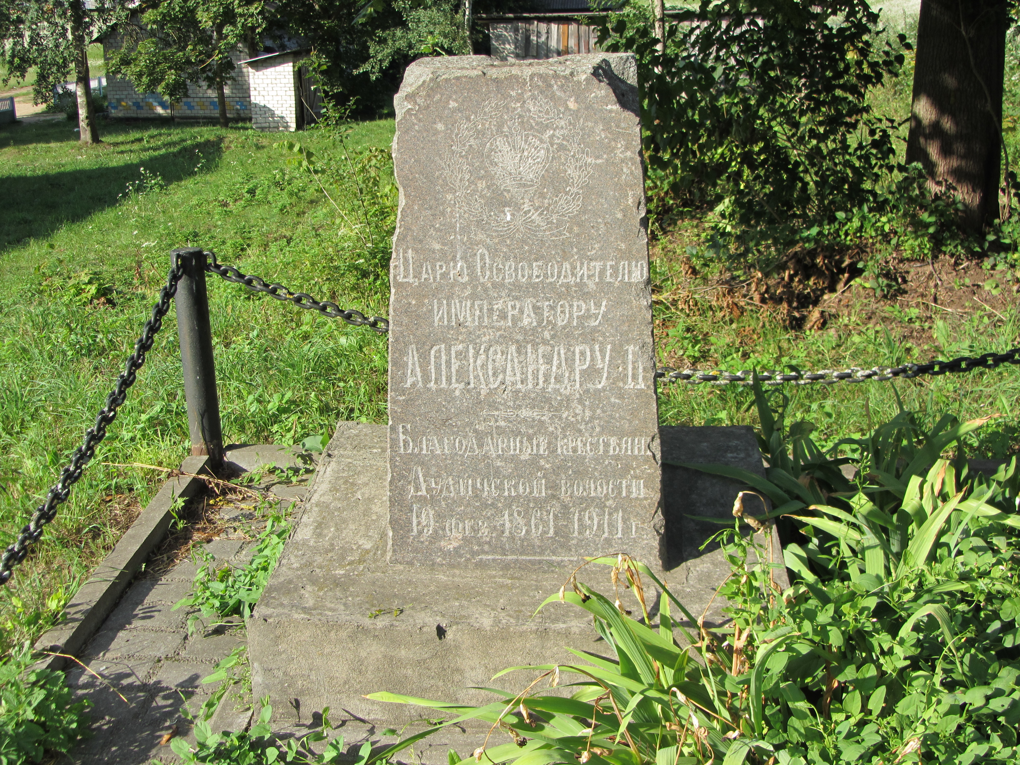 Беларуская (тарашкевіца): Мэмарыяльны знак «Аляксандру II ад удзячных сялянаў» у Дудзічах.